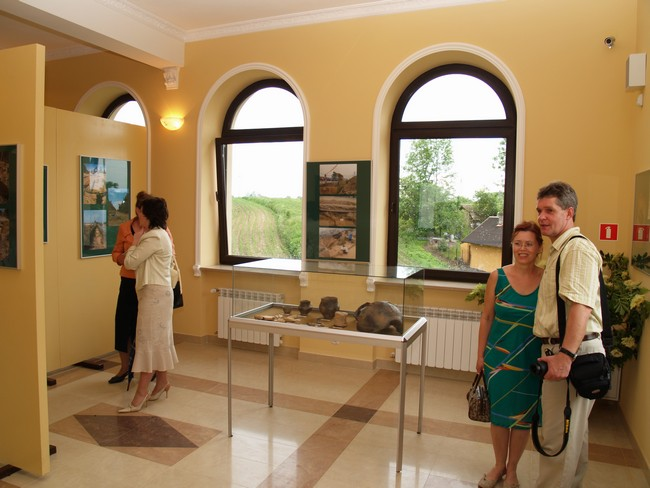 wnetrze synagogi w koszycach po remoncie, eksponaty - wykopaliska sprzed 3600 lat